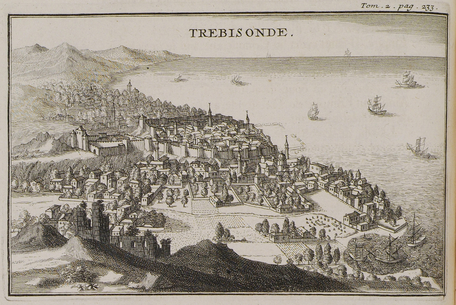 Joseph Pitton de Tournefort. Relation d’un Voyage du Levant, fait par ordre du Roy. Contenant l’histoire ancienne & moderne de plusieurs Isles de l’Archipel, de Constantinople…, vol. I, Paris, Imprimerie Royale, 1717.